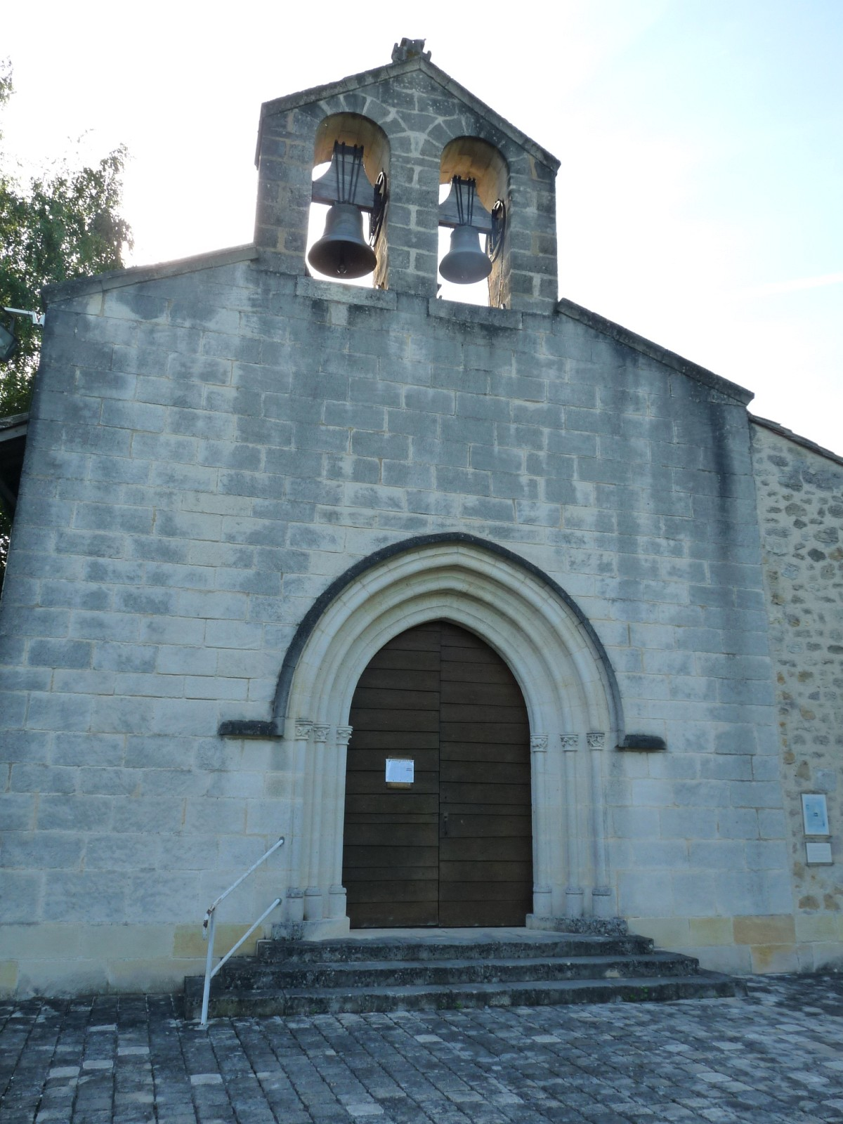 Eglise de St-Seurin-sur-l'Isle, Gironde, France